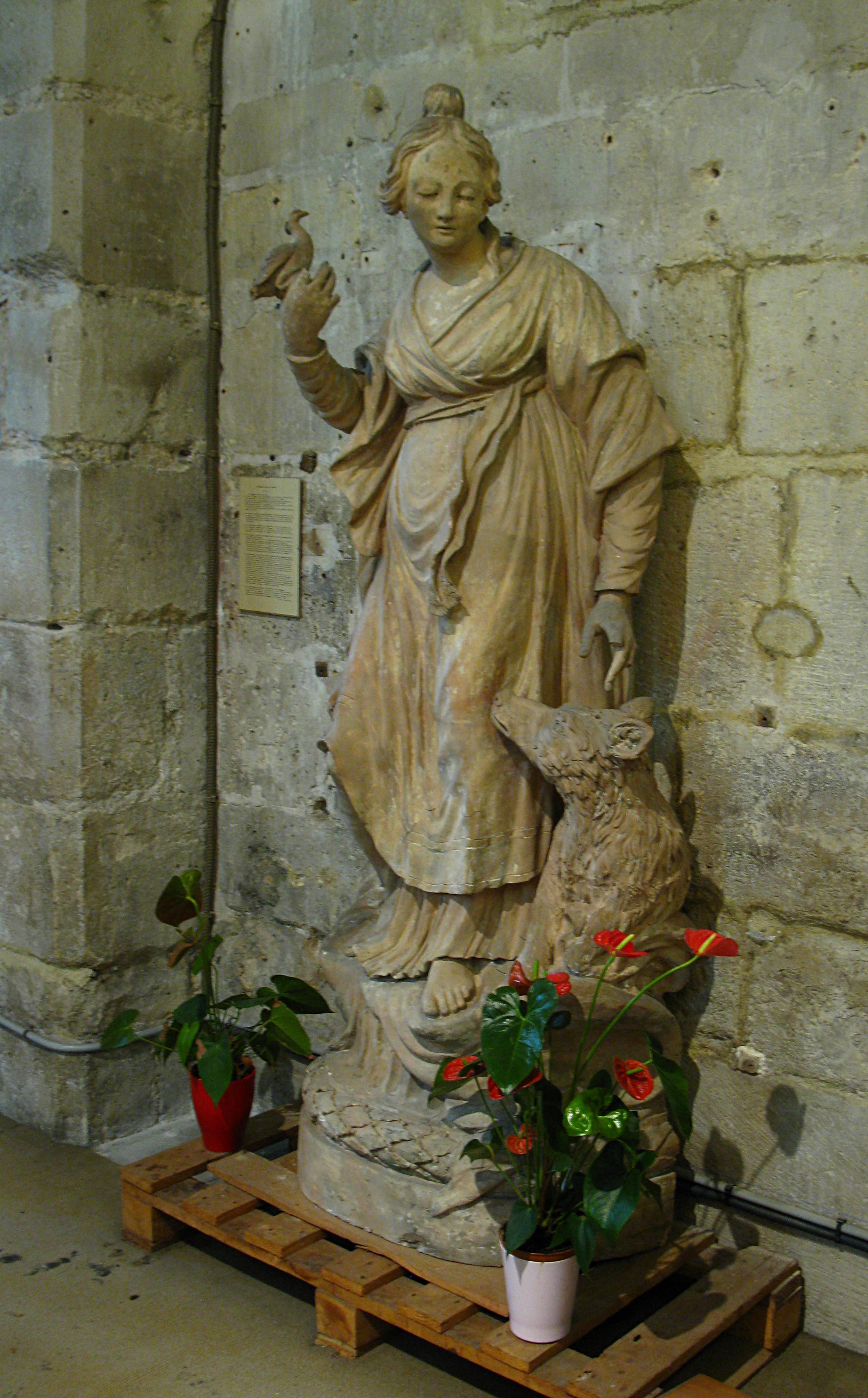 Statue en terre cuite du 19ème siècle dans l'église Sainte-Colombe de Chevilly-Larue, représentant Sainte-Colombe .